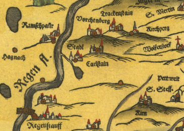 Burg Stadel auf Apian Bairische Landtafeln von 1568